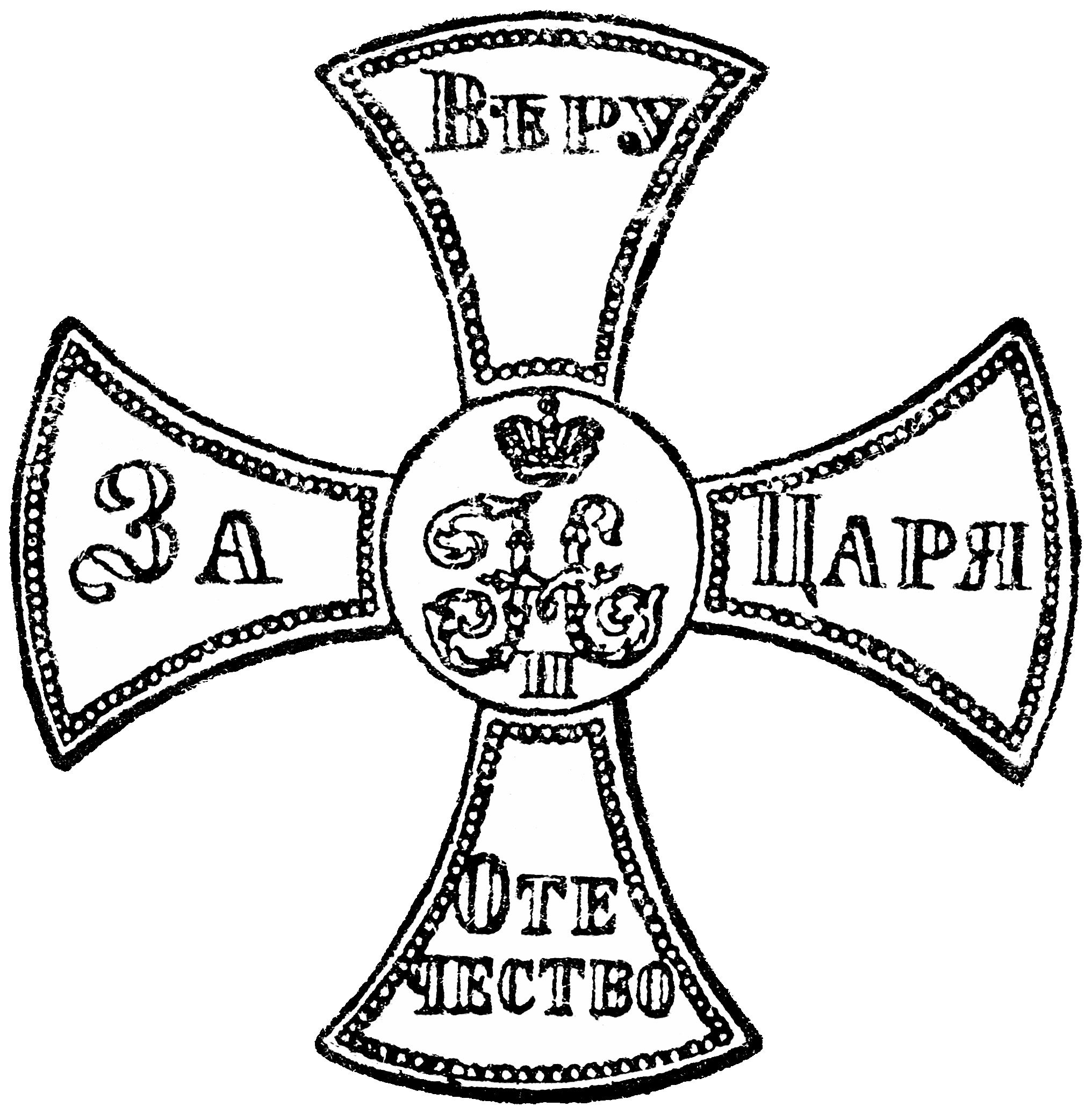 Рисунок креста с девизом и вензелем на обложке Ополченского билета.